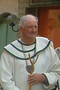 Maurice Bousquet maire de St Andéol-de-Berg, en 2012